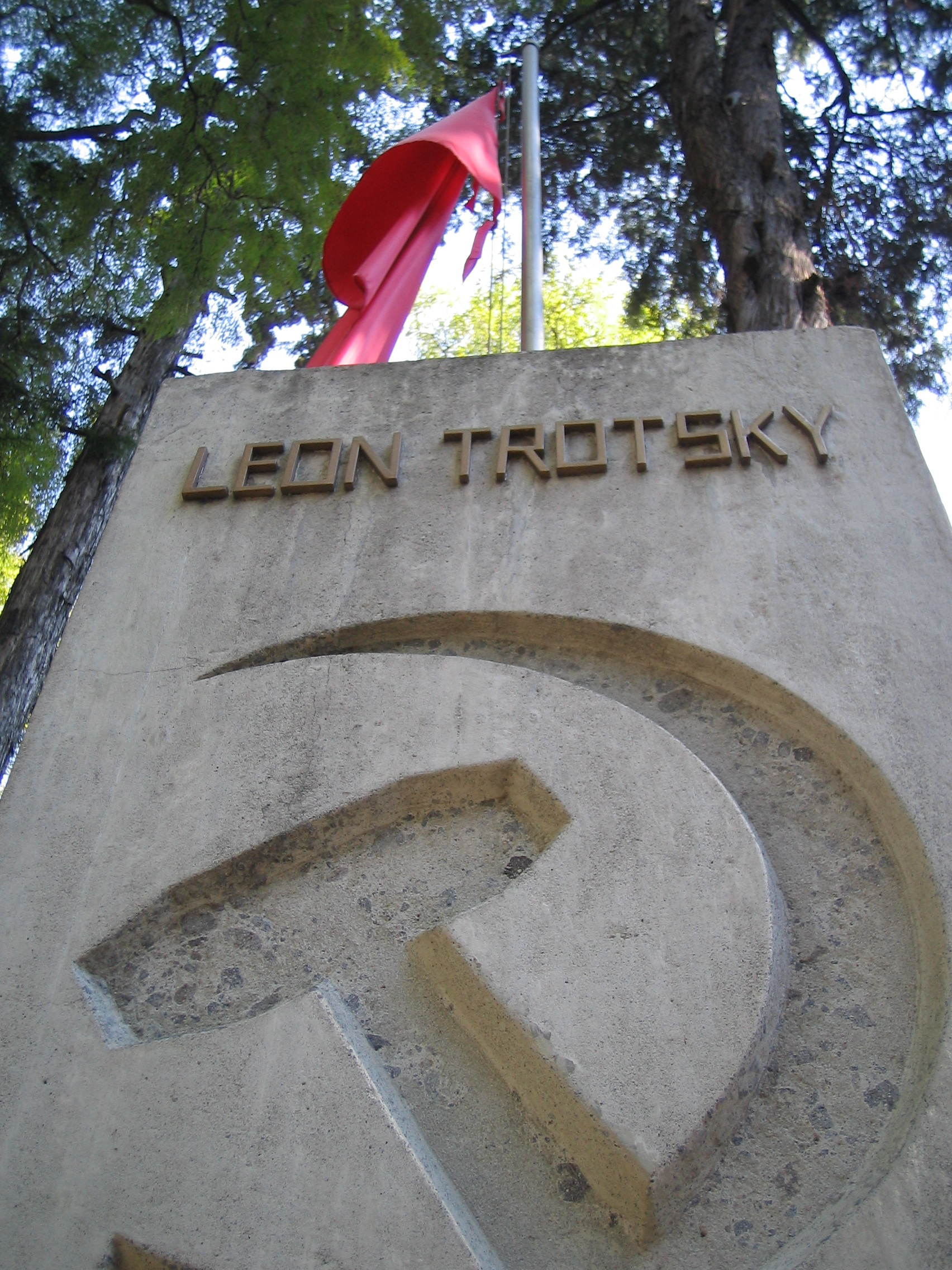 León Trotsky